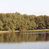 Jezioro Lidzbarskie, półwysep od strony wschodniej (C) 2004 PiotrB.